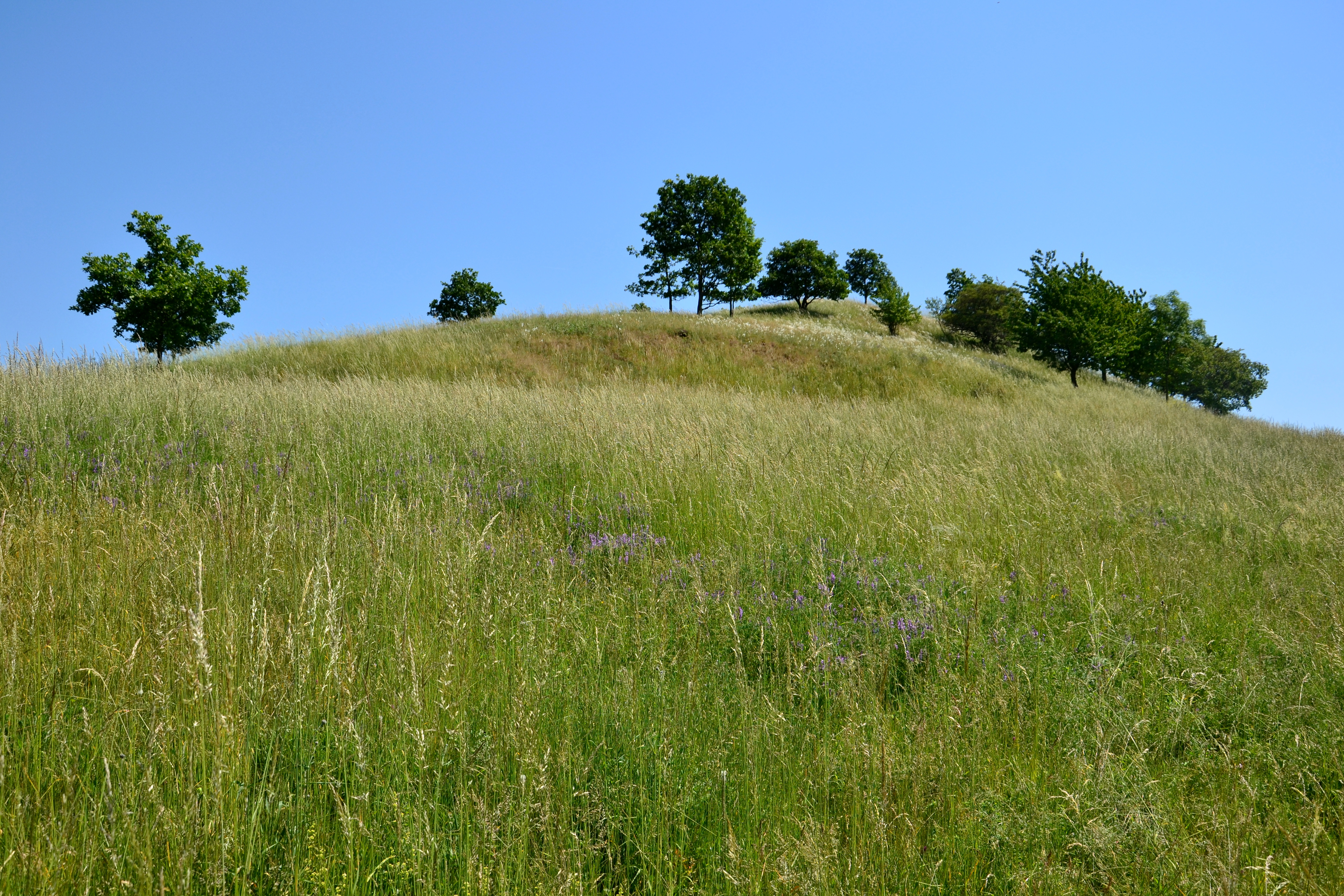 Celkový pohled na PR Dřínek